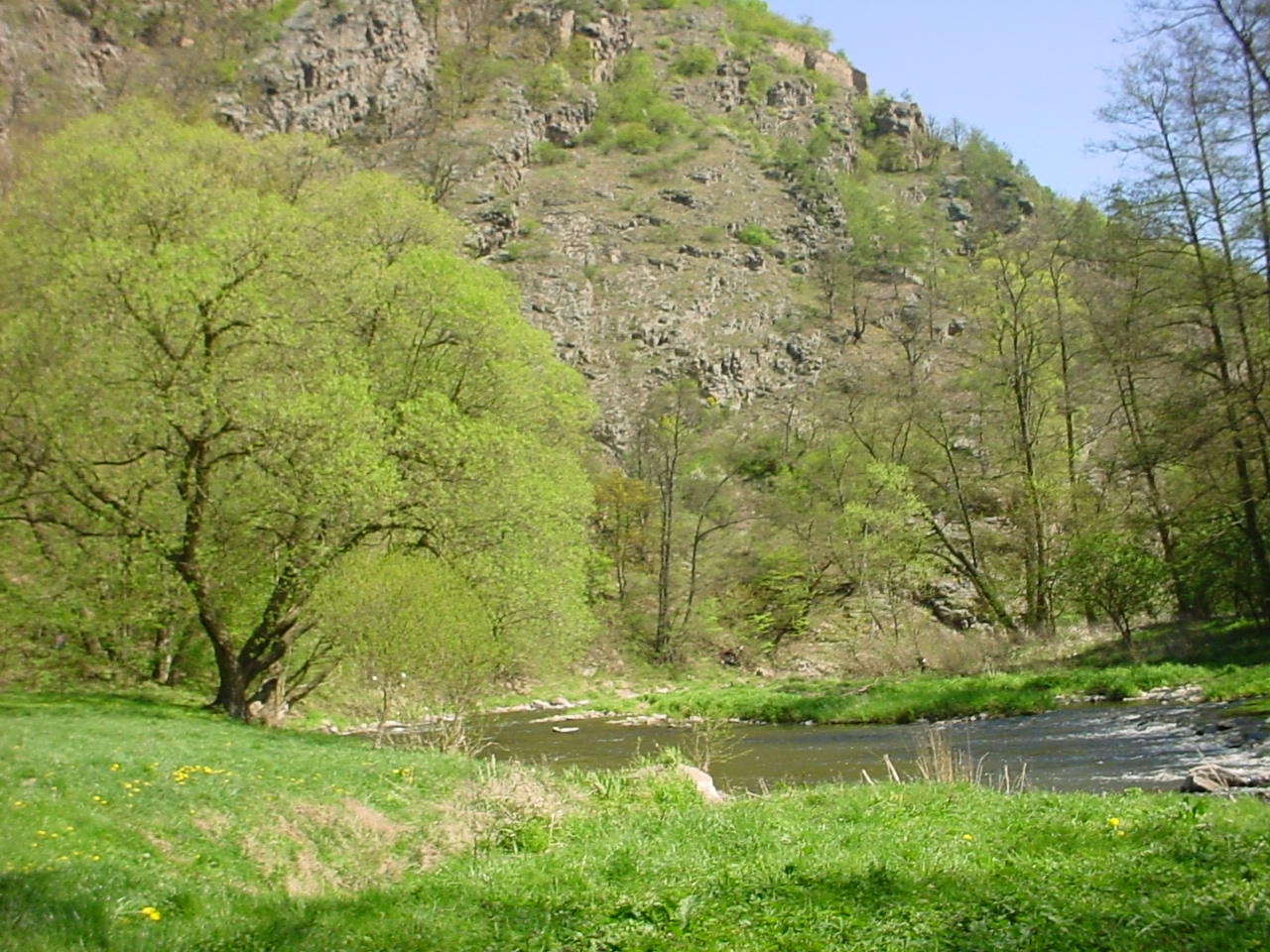 Oslava pod Levnovem